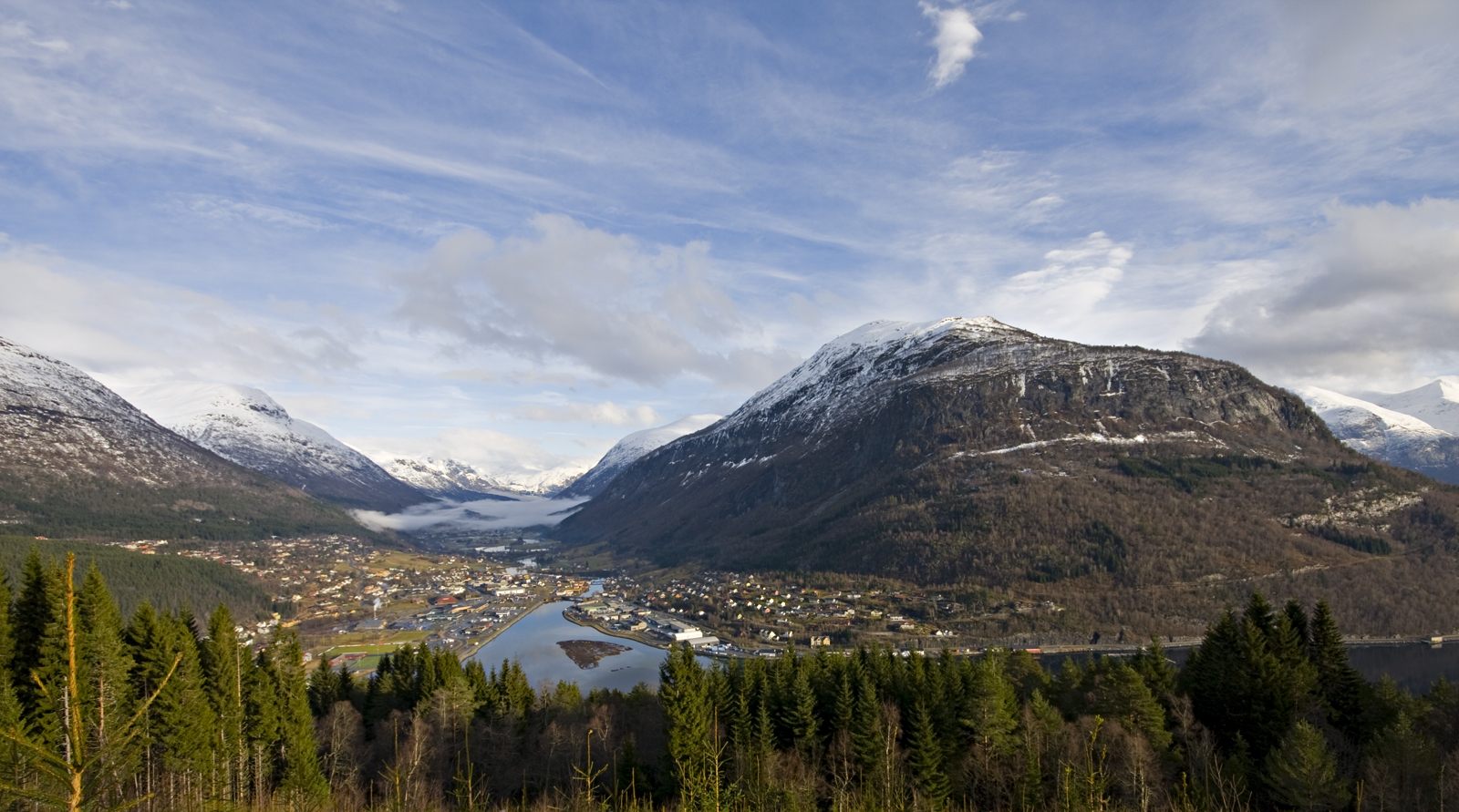 Tettstaden Stryn i Stryn kommune, ved Strynebukta i Faleidfjorden. Elva som renn gjennom tettstaden heiter Stryneelva